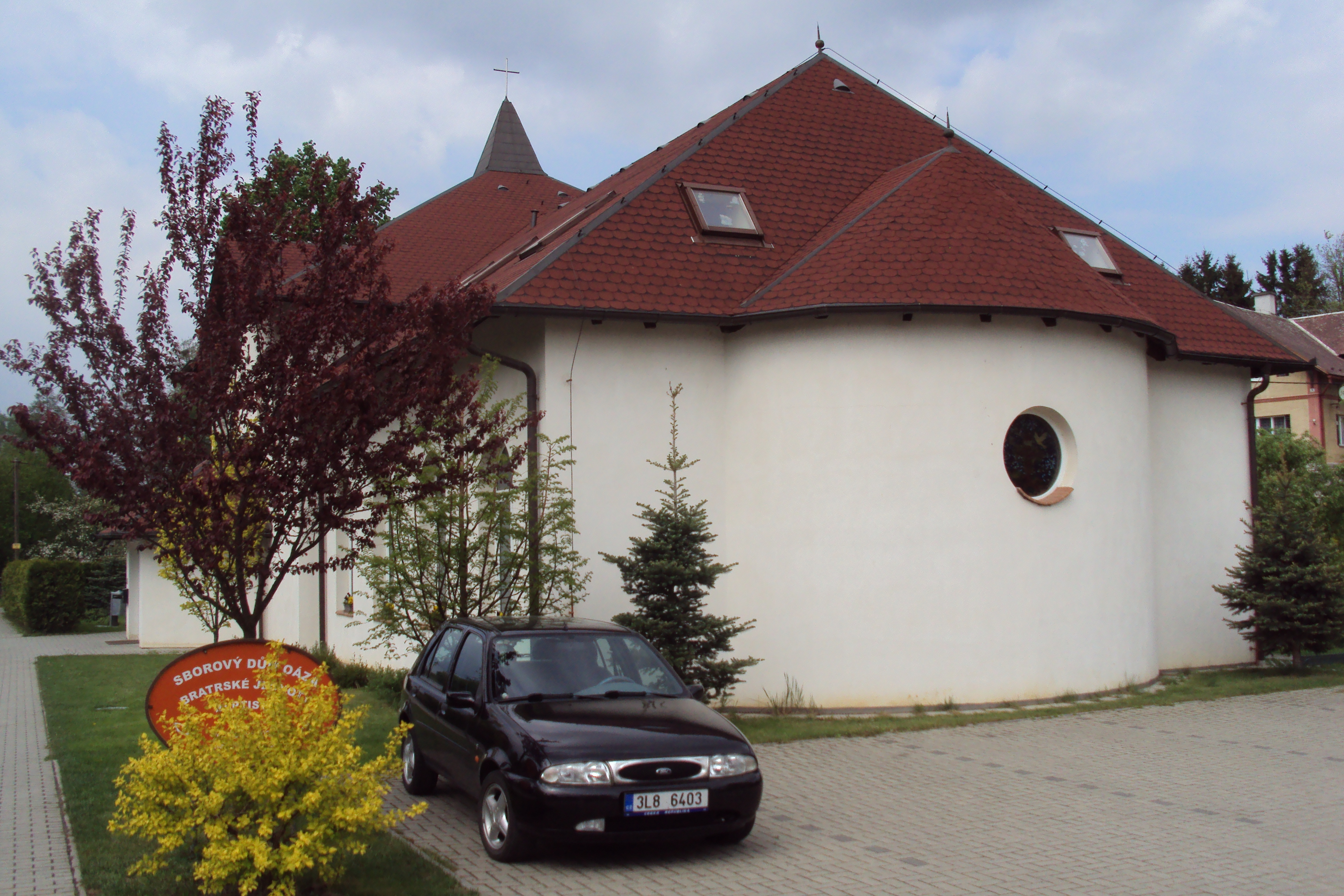 Sborový dům Oaza baptistů v Brništi